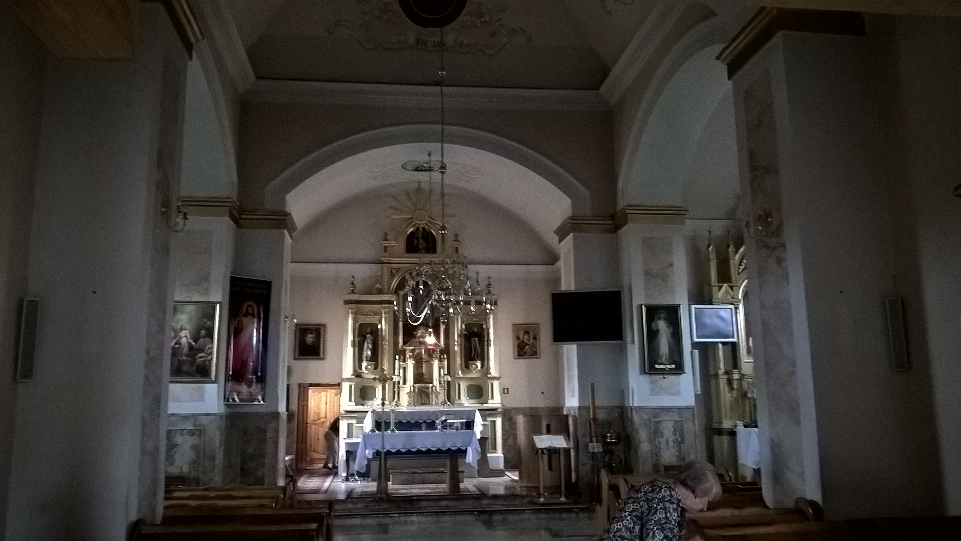 Wnętrze dawnej cerkwi, ob. kościoła w Soli